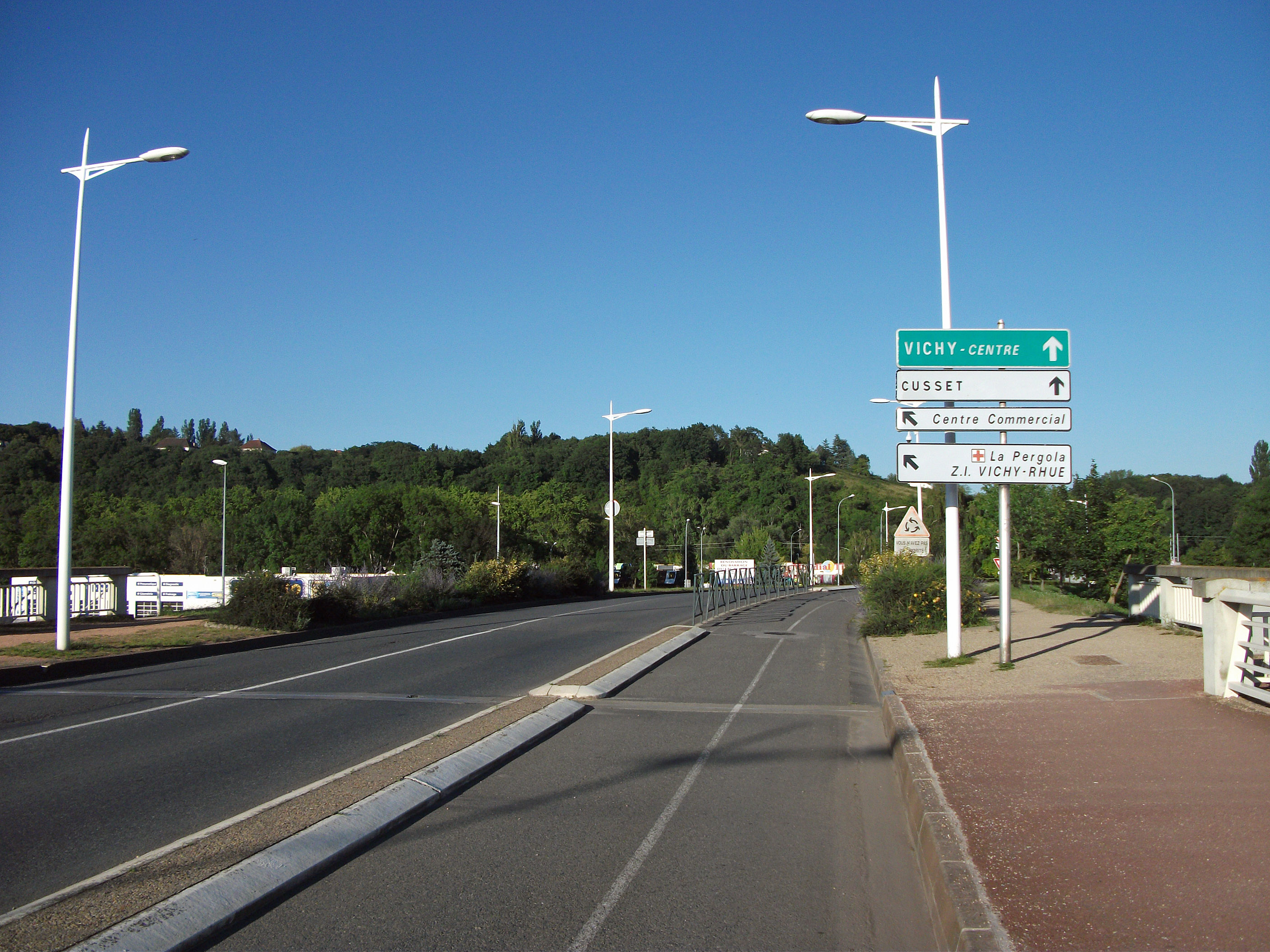 Fin du pont de l'Europe côté Vichy - la piste cyclable est sur le côté amont du pont - Panneaux de 1986 en état encore correct